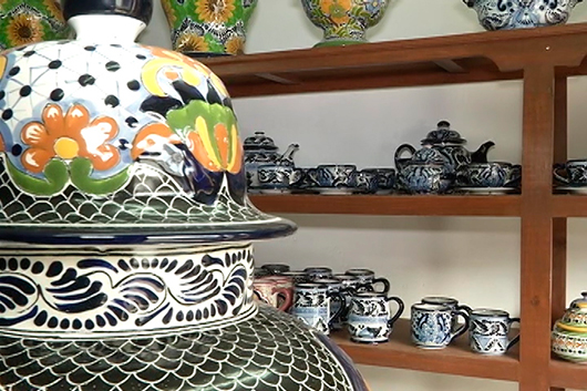 Tlaxcala